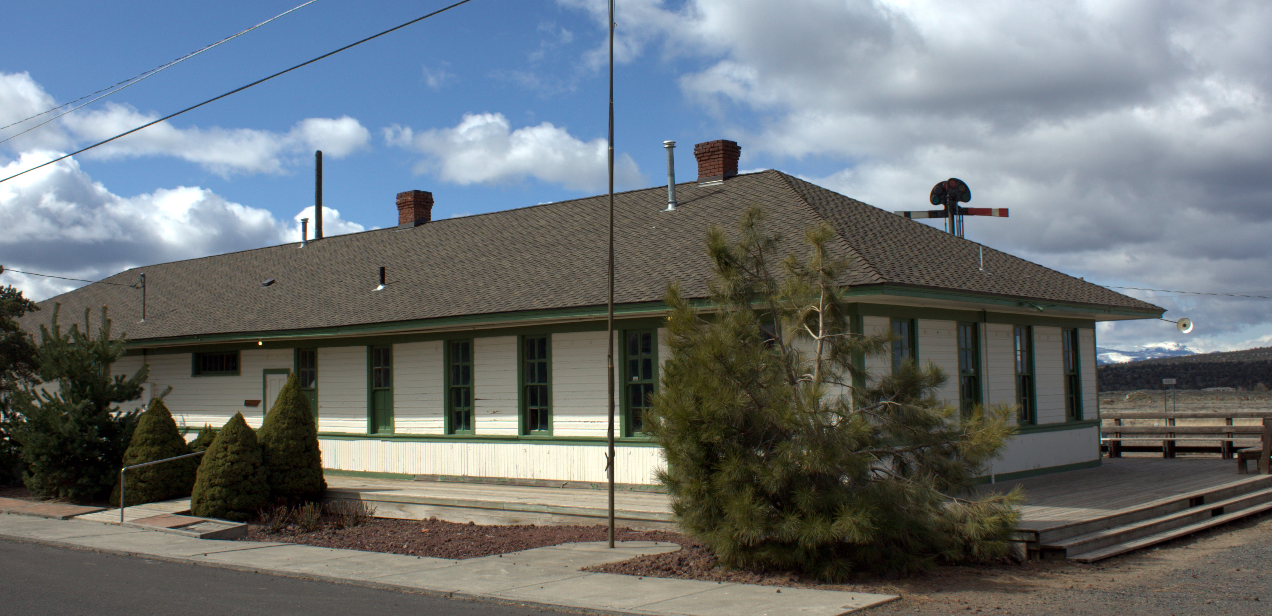 Železniční depo v okrese Jefferson ve státě Oregon, USA